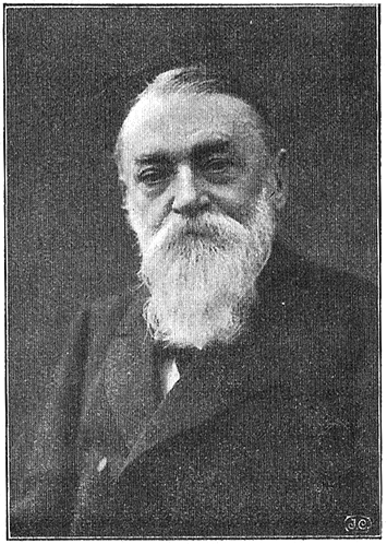 Harald Wieselgren (1835-1906).